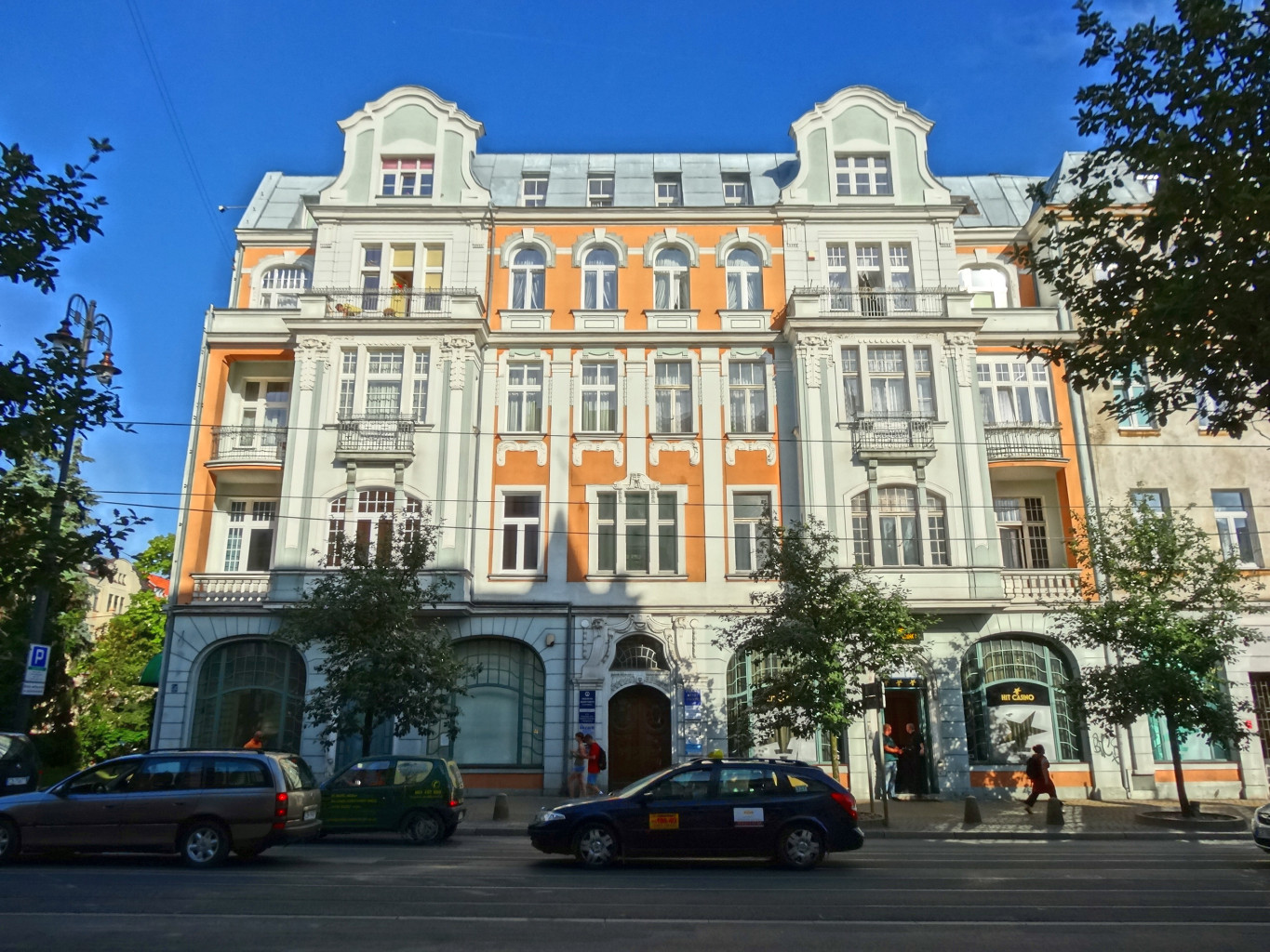 Kamienica przy ul. Gdańskiej 68 w Bydgoszczy (1904-1905)